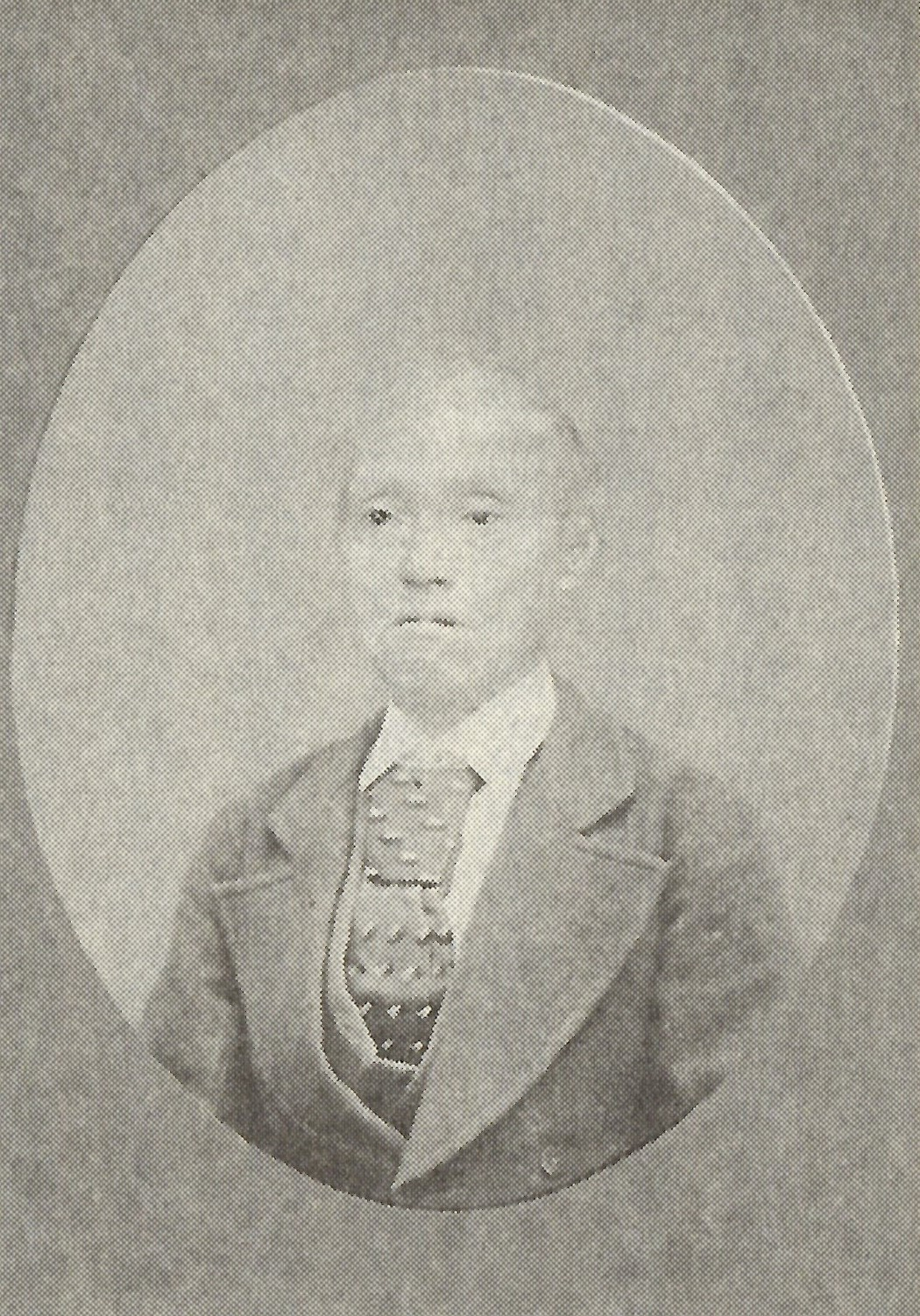 大炊御門家信の肖像写真。